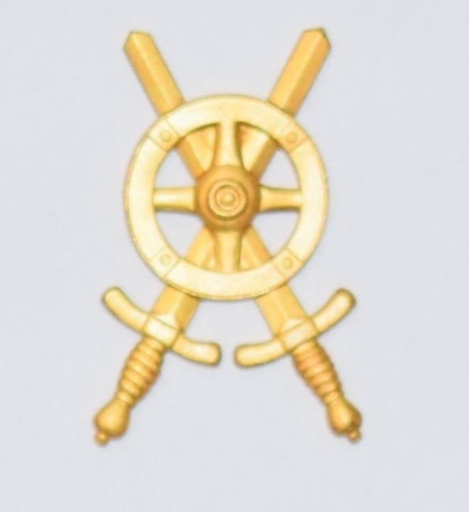 Truppslagstecken m/60 för trängtrupperna